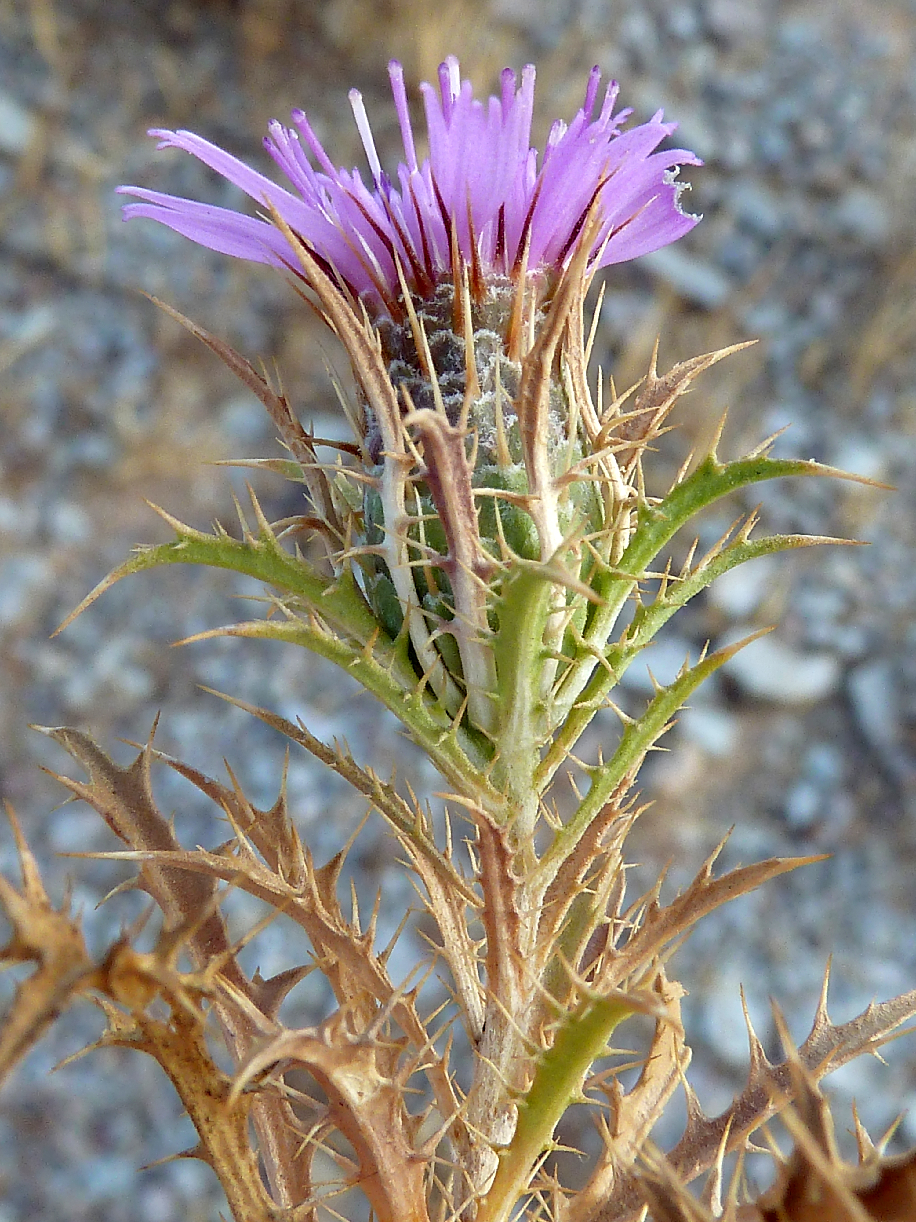 Atractylis humilis - Capítulo en antesis. - circa Cementerio/circumvalación Norte, Águilas (Provincia de Murcia, España).